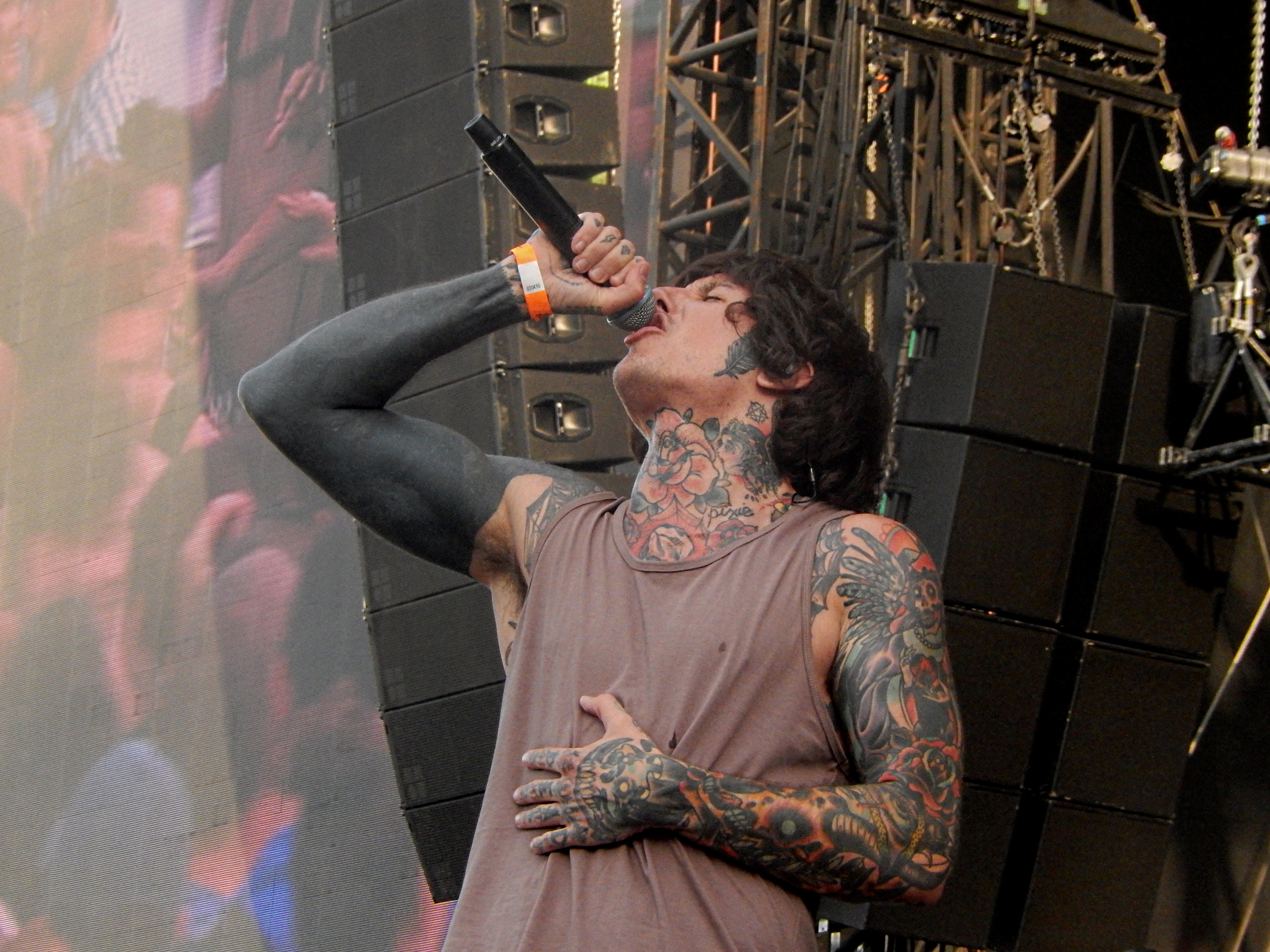 Bring Me The Horizon, Rock en Seine 2016, Paris